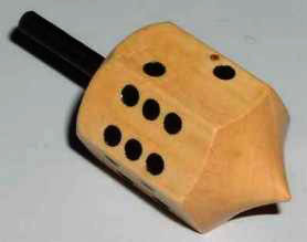 A 6-sided spinner.